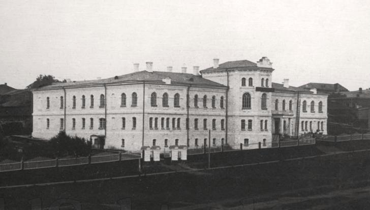 Здание Усть-Сысольского духовного училища.